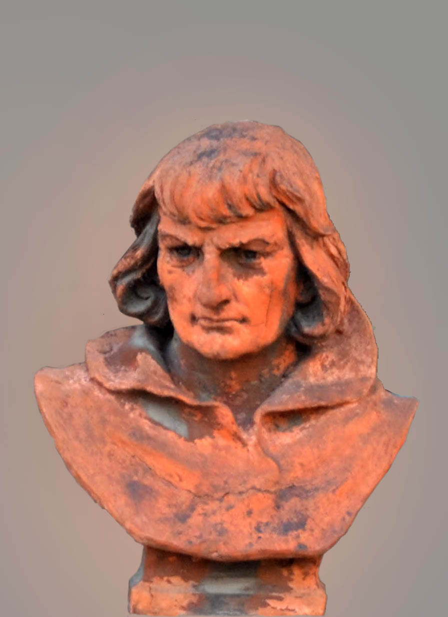 Frans Ackerman (ou Frans Ackermann ou encore François Ackerman) est un personnage qui a vécu au XIVe siècle, probablement né à Gand en Belgique (vers 1330) et mort à Gand le 22 Juillet 1387.